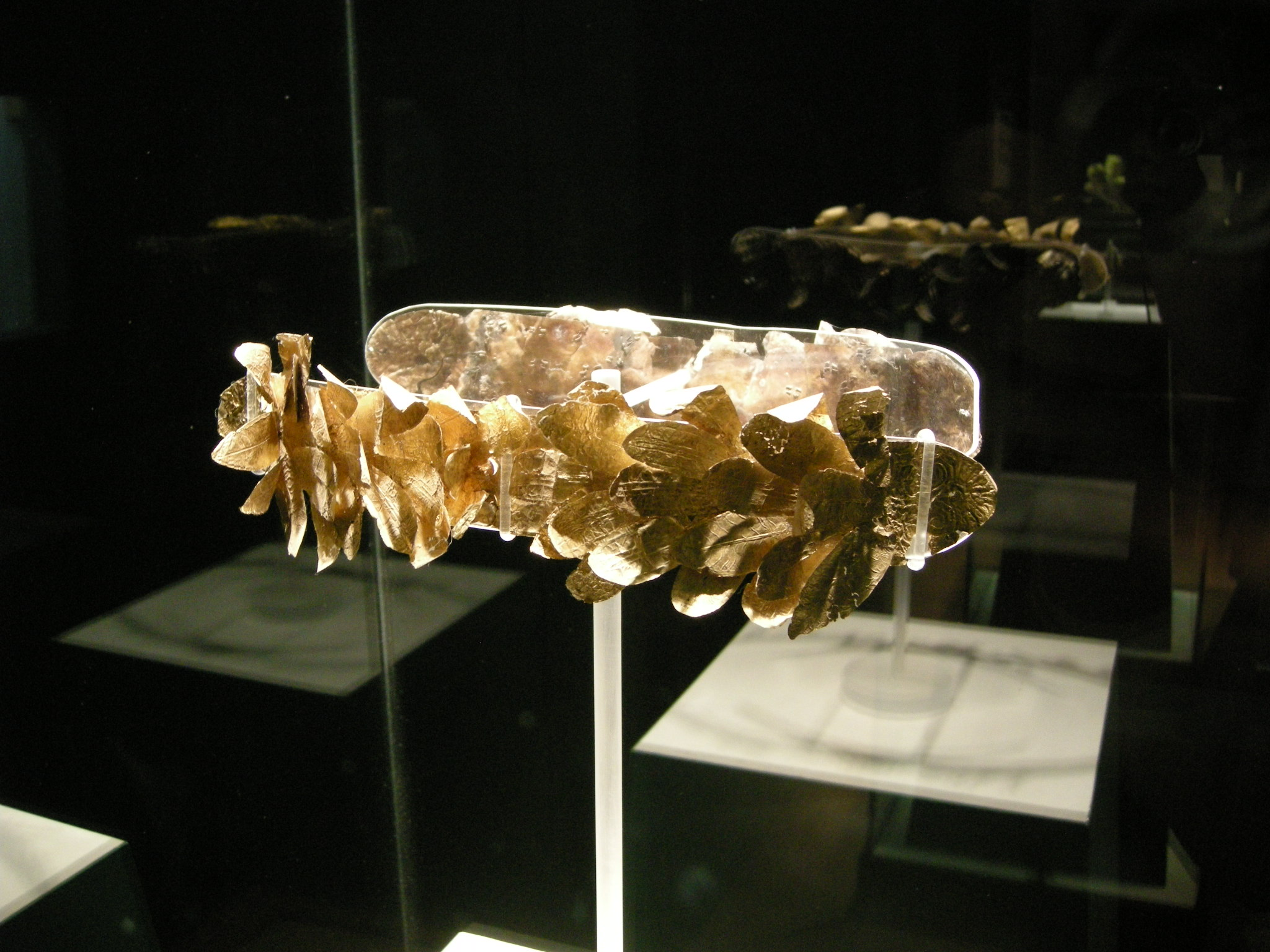 Museo guarnacci, corona d'alloro dorata